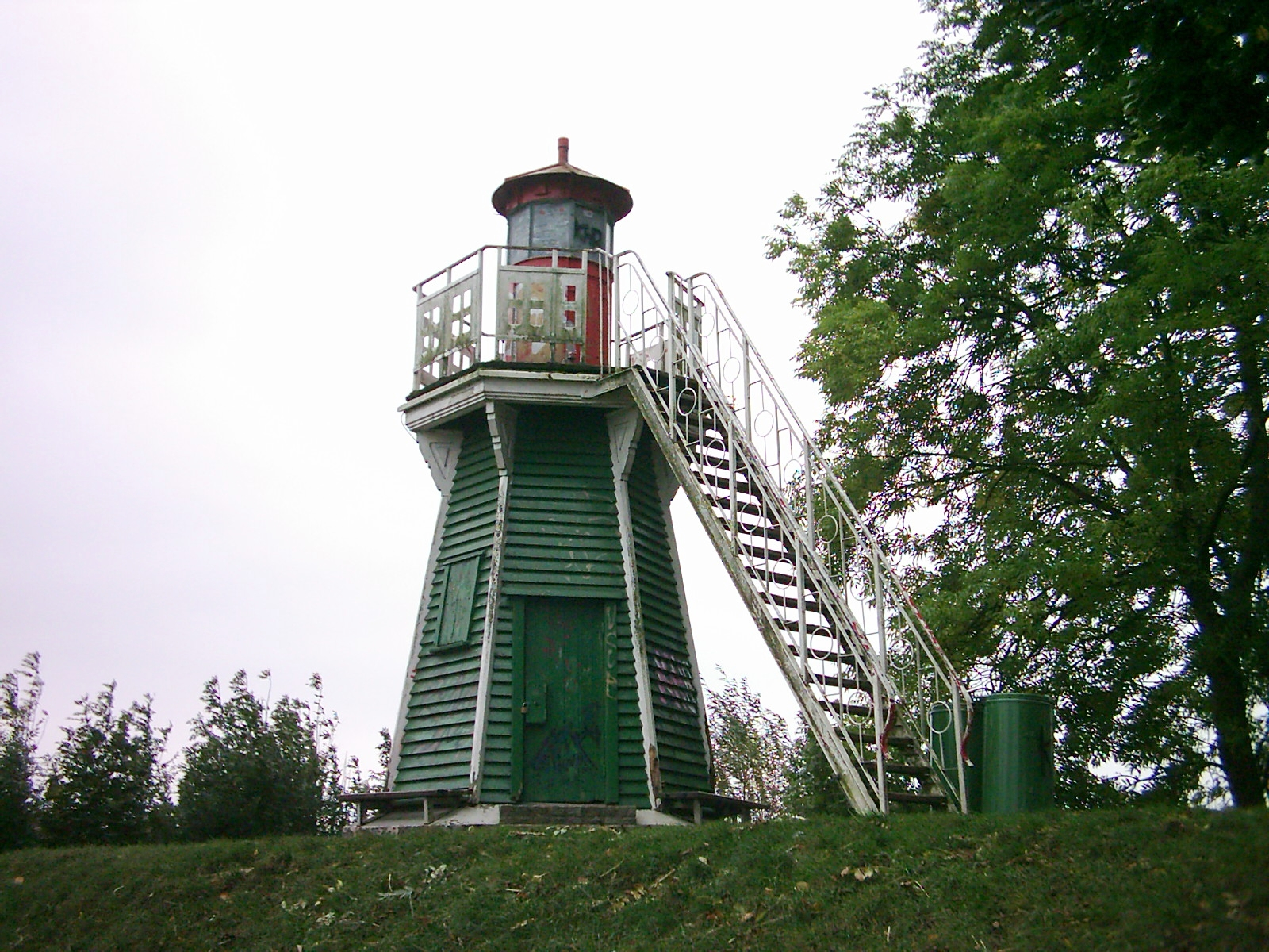 Der Leuchtturm auf der Bunthäuser Spitze (erbaut 1914, nicht mehr in Betrieb).